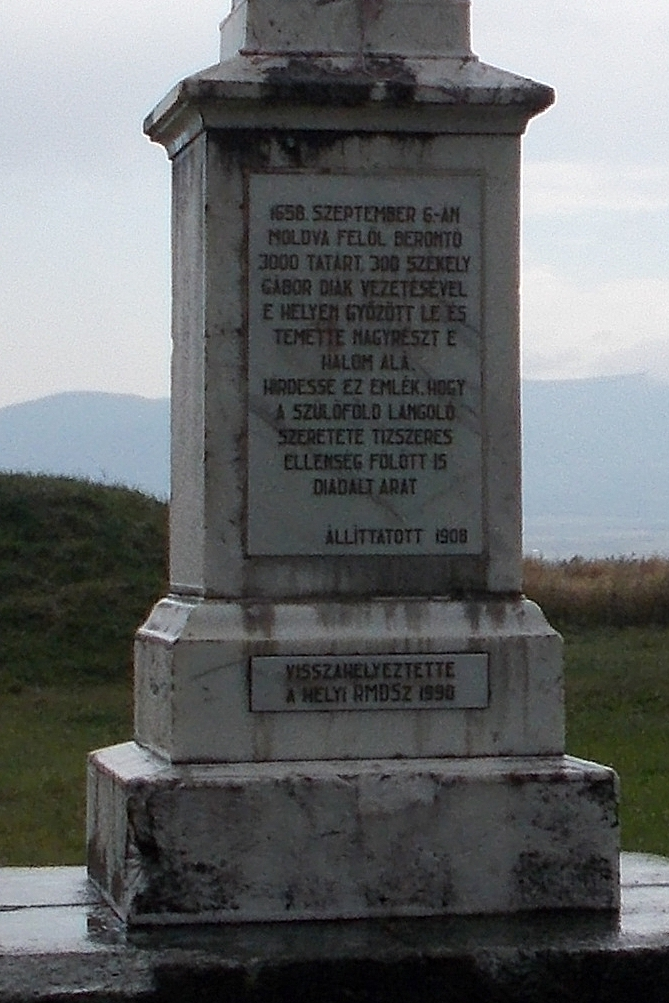 A gyergyószárhegyi Tatárdomb emlékoszlopának felirata